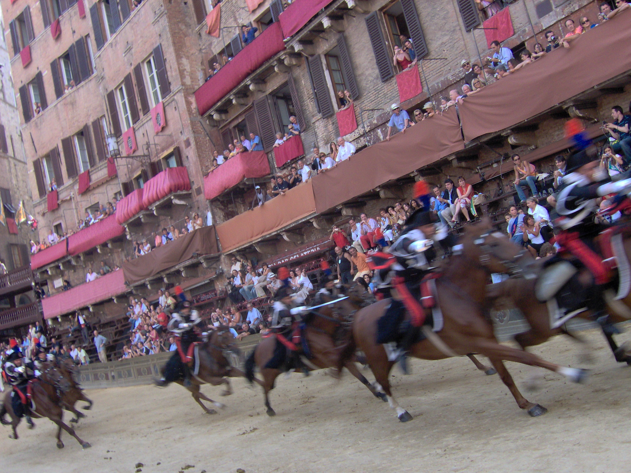 Image Palio dell'Assunta (16/08/2006) - Siena